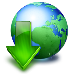 Vista Icons Toolbar